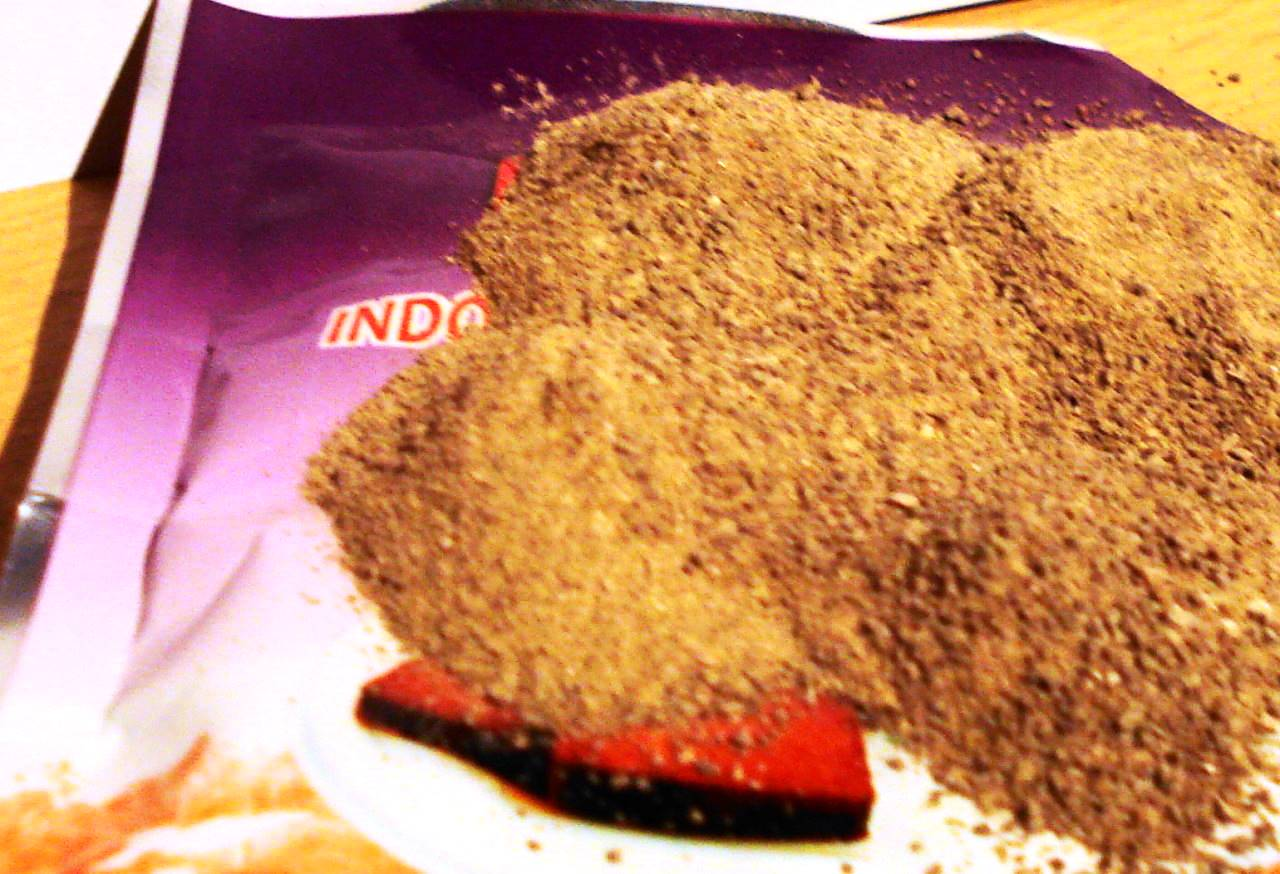 Trassie poeder